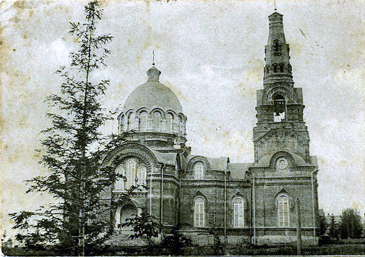 Софийский собор Барятинского монастыря. Фото 1910-х годов